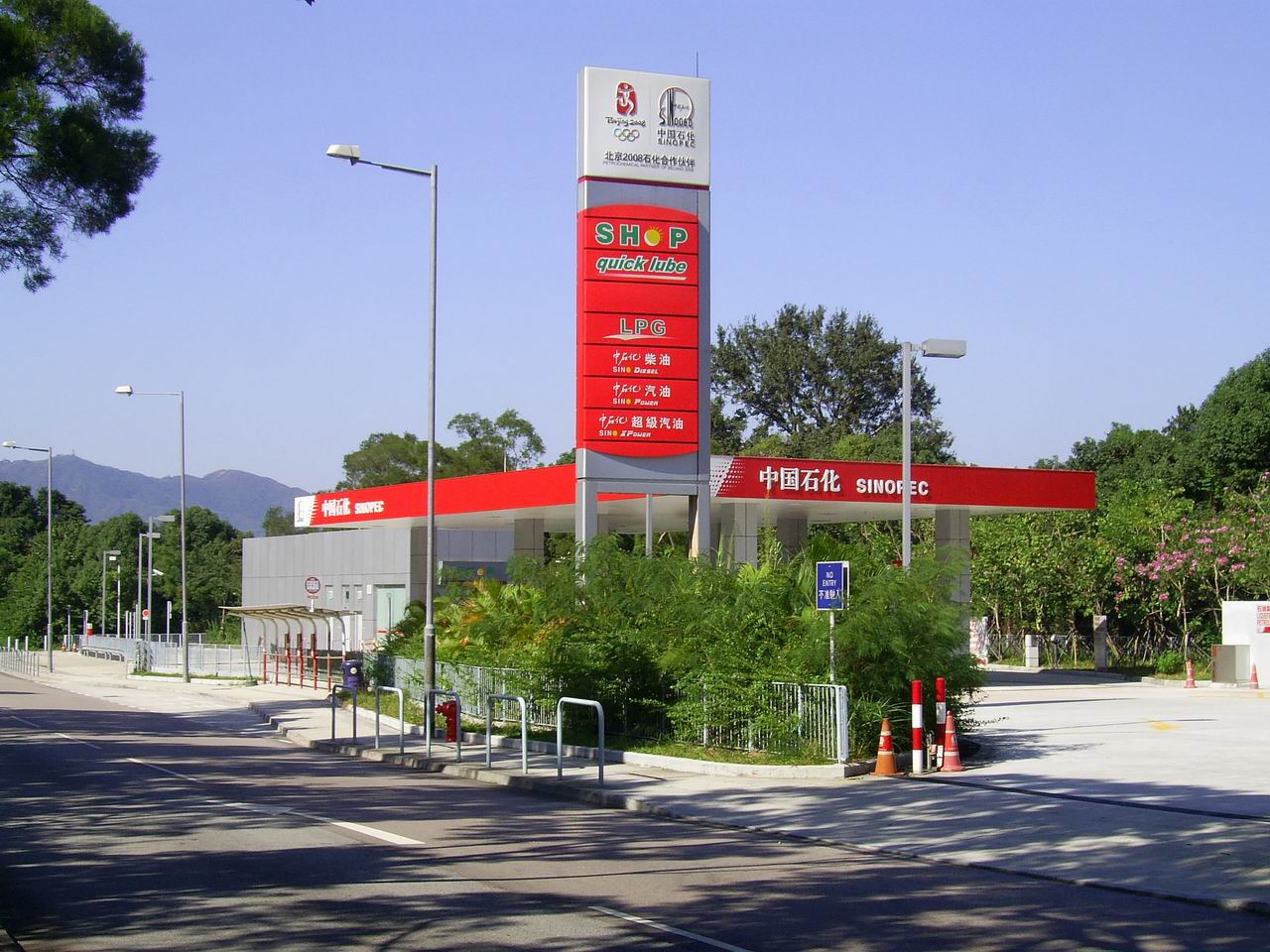 中文（香港）: 位於大埔公路大埔滘段的中國石化加油站